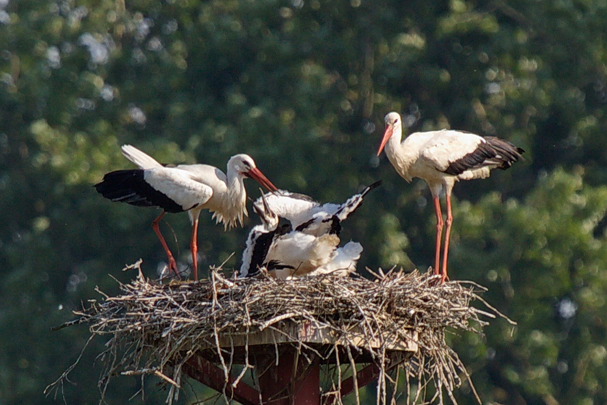 Storchenpaar beschäftigt mit der Fütterung des Nachwuchses im NSG Bislicher Insel